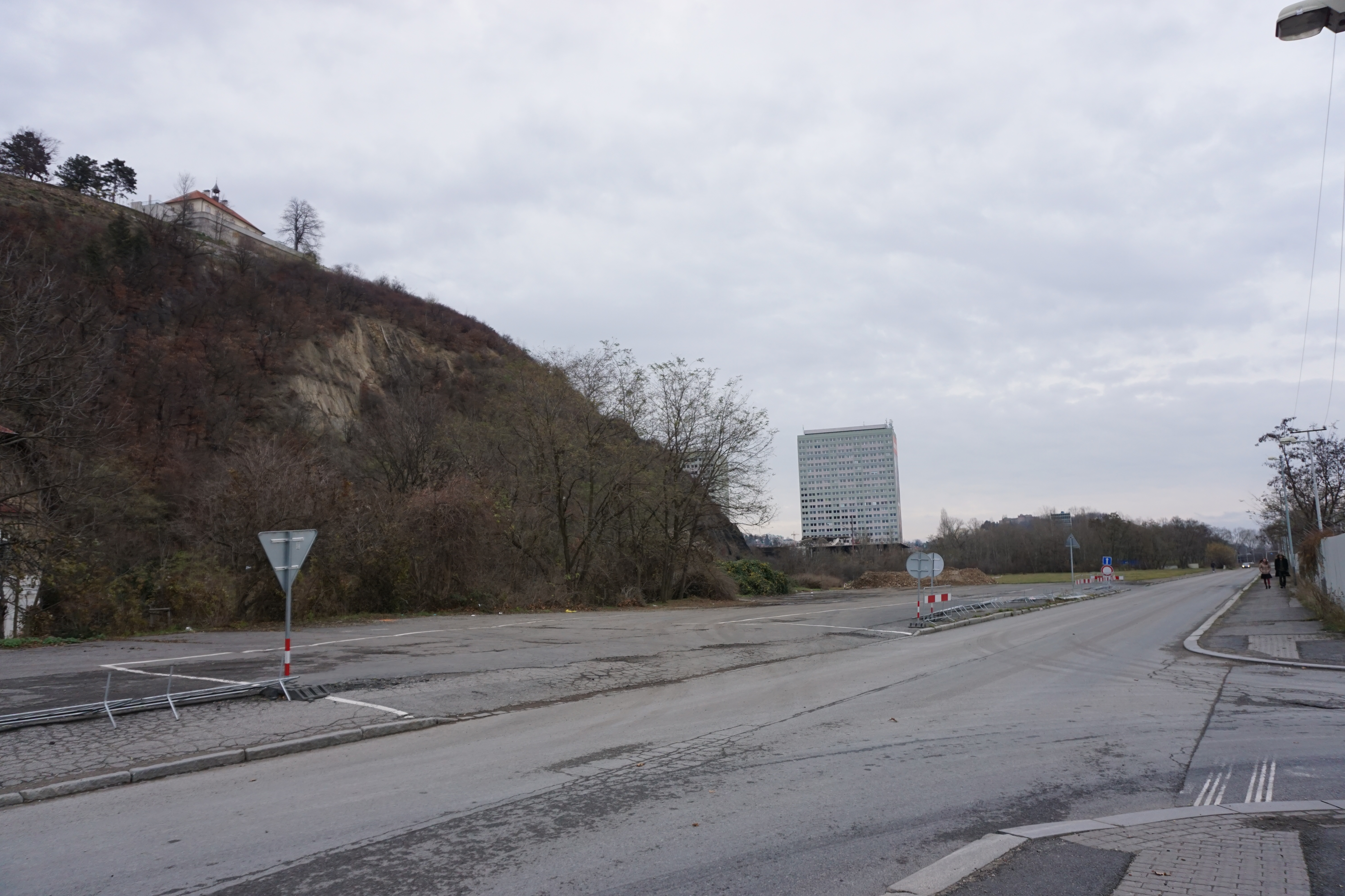 Výhled z Povltavské ulice na PP Jabloňka a kolej 17. listopadu